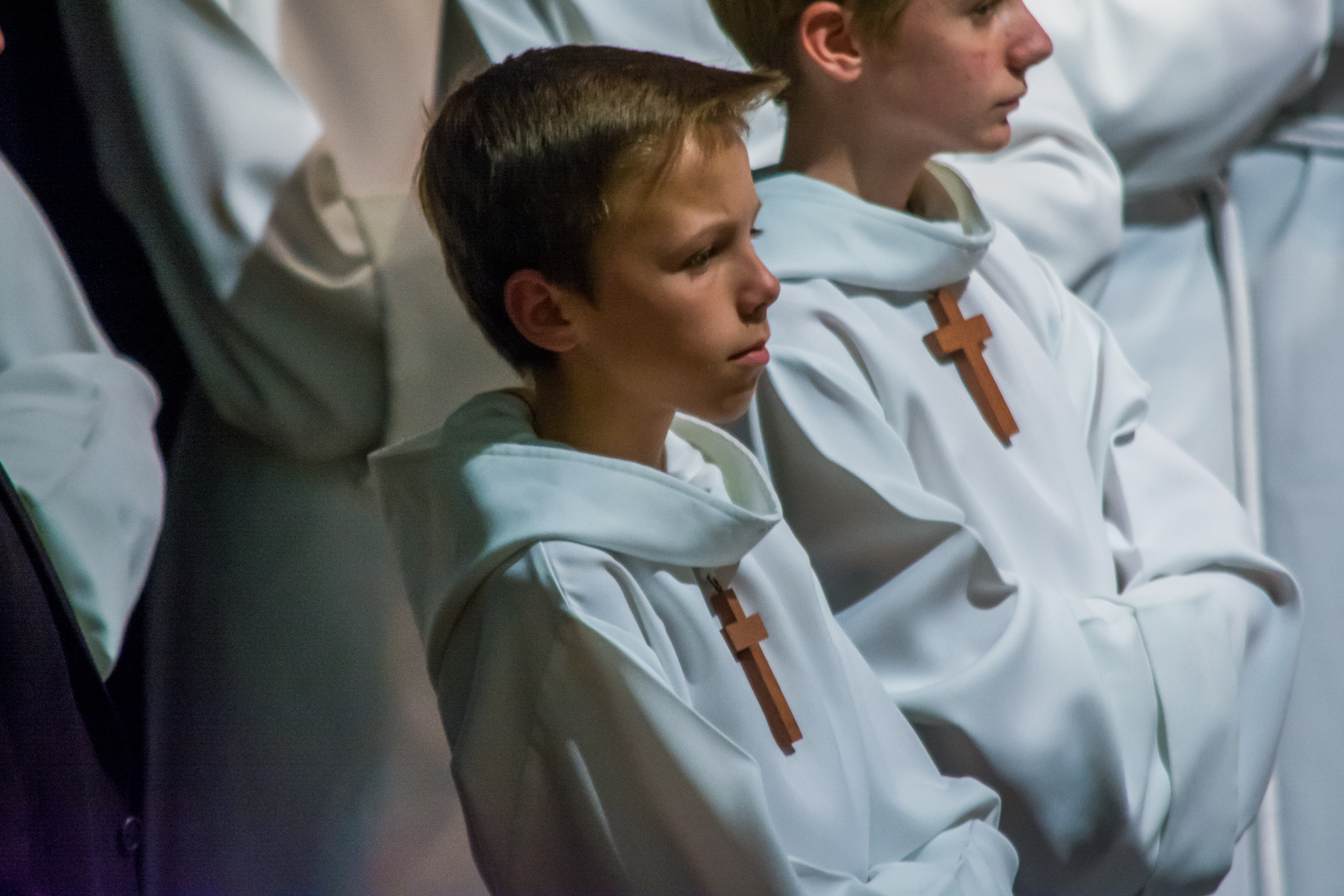 Хор «Маленькие певцы Парижа» (Les Petits Chanteurs à la Croix de Bois) на концерте в Юсуповском дворце (Санкт-Петербург, Россия) 24 октября 2016 года